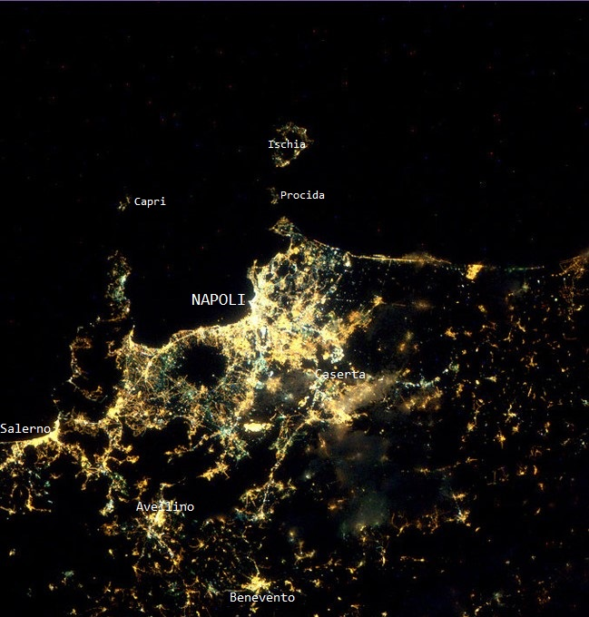 immagine satellitare di Napoli e della Campania